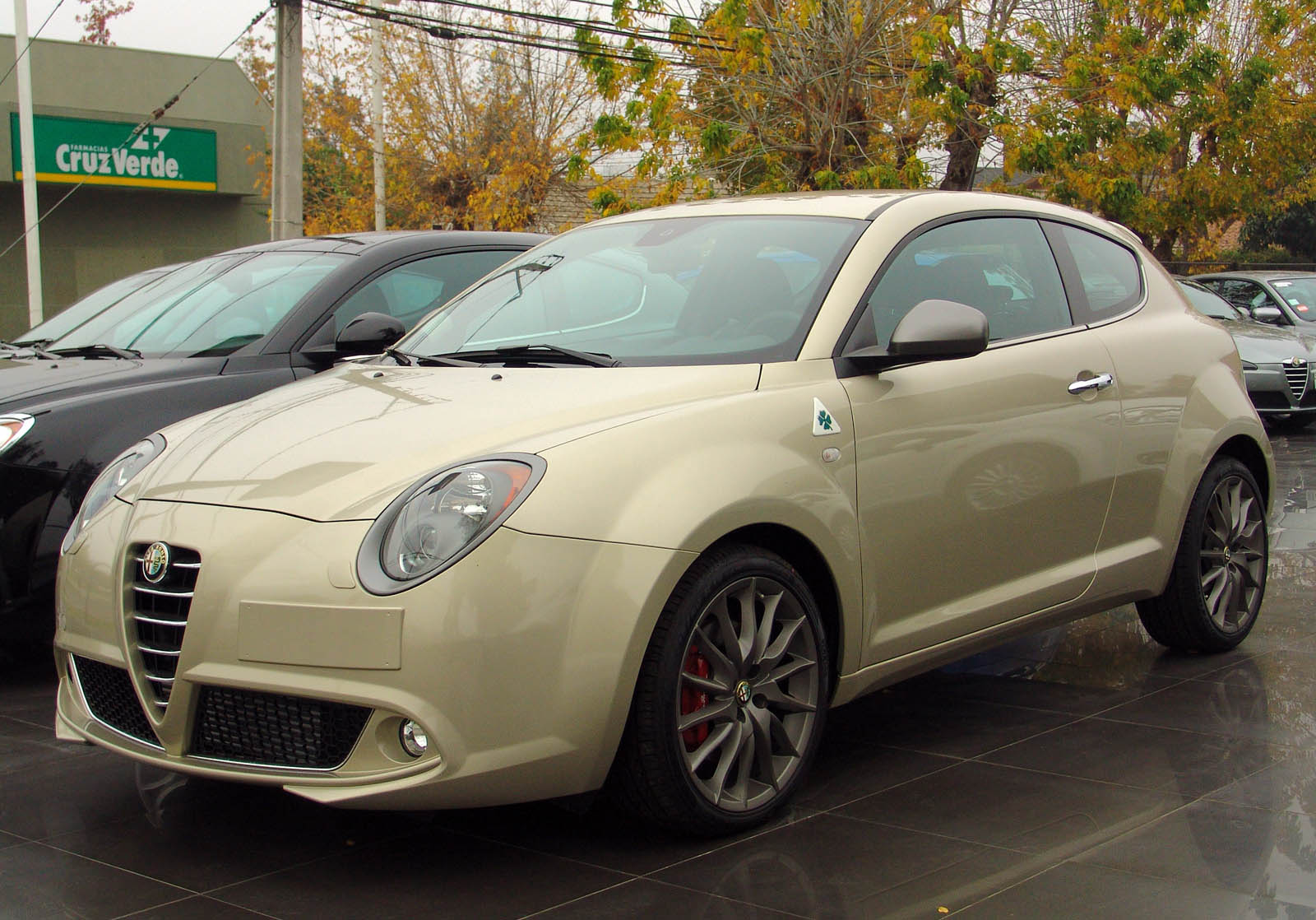 alfa romeo verde